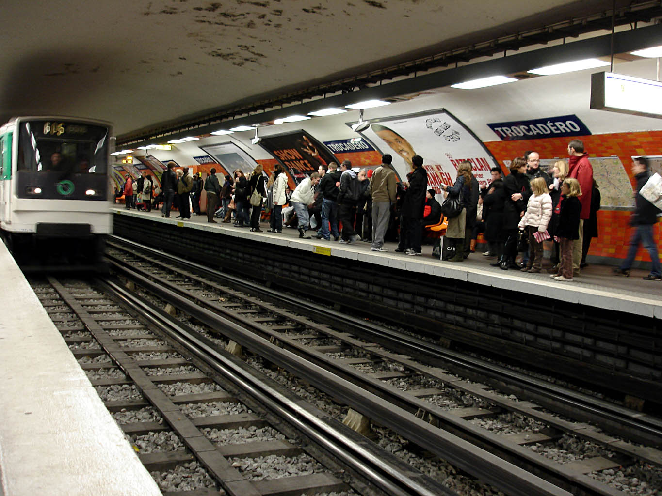 Métro de Paris (France) - ligne 6 - Station Trocadéro